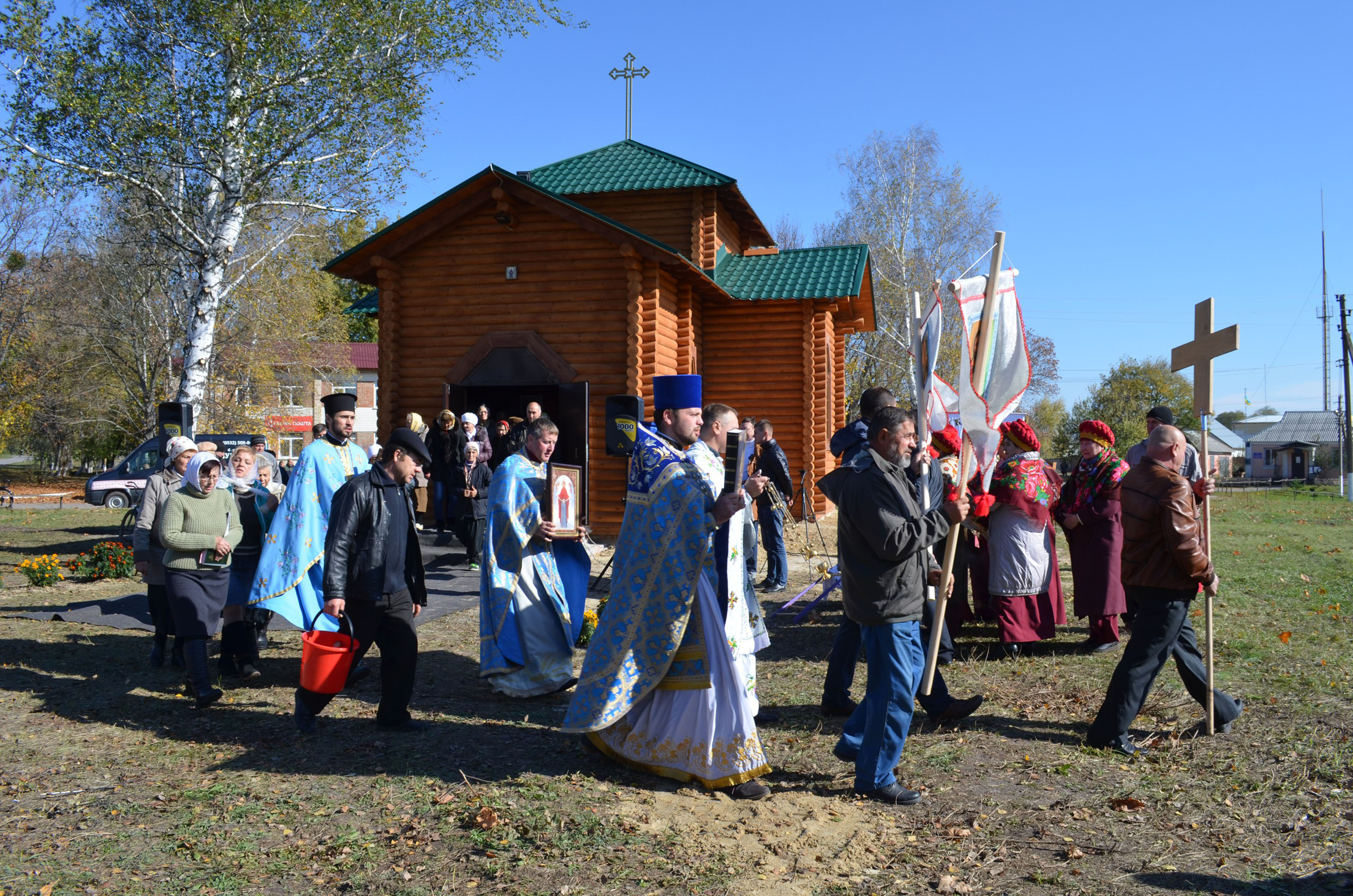 Храм побудований у 2016 році.